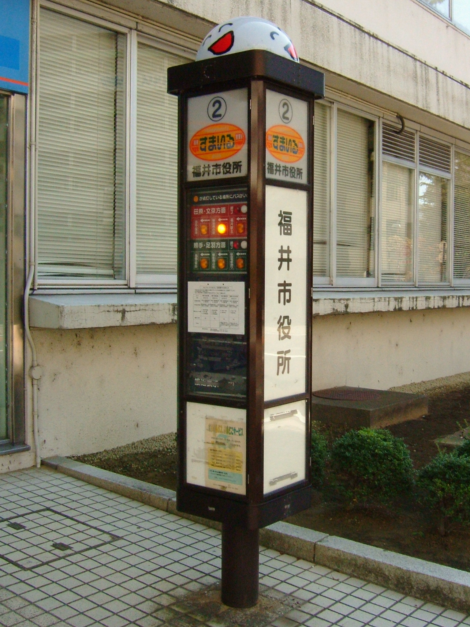 福井県福井市のコミュニティバス「すまいる」のバス停（福井市役所バス停）